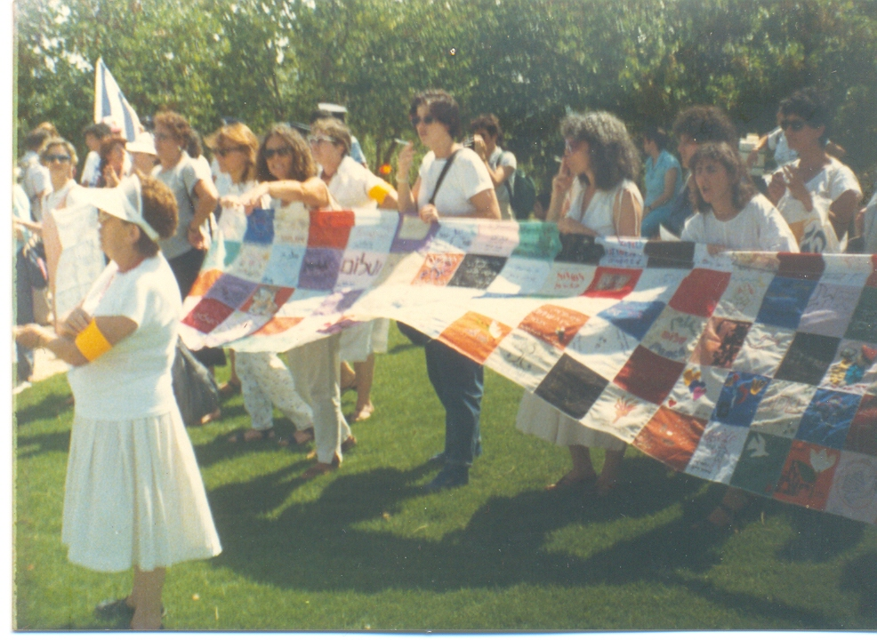 מפת השלום 1988 ירושלים